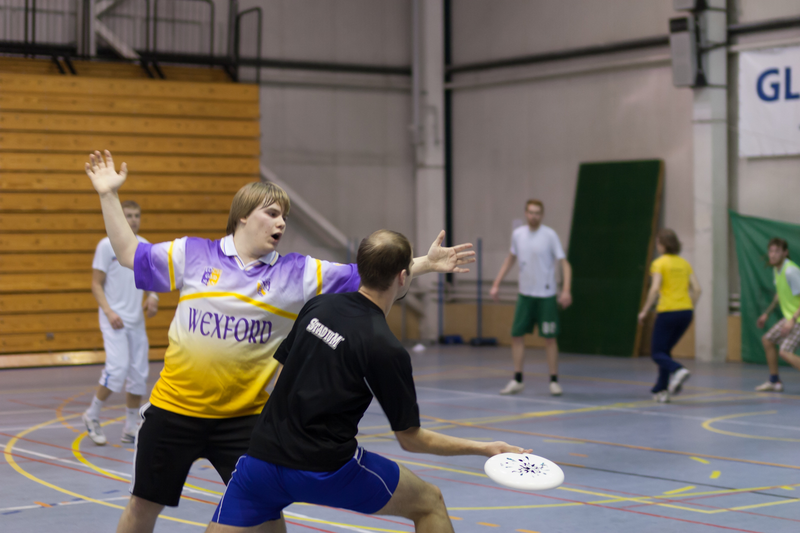 Tartu frisbeeklubi. Tartu Ülikooli spordihoone.